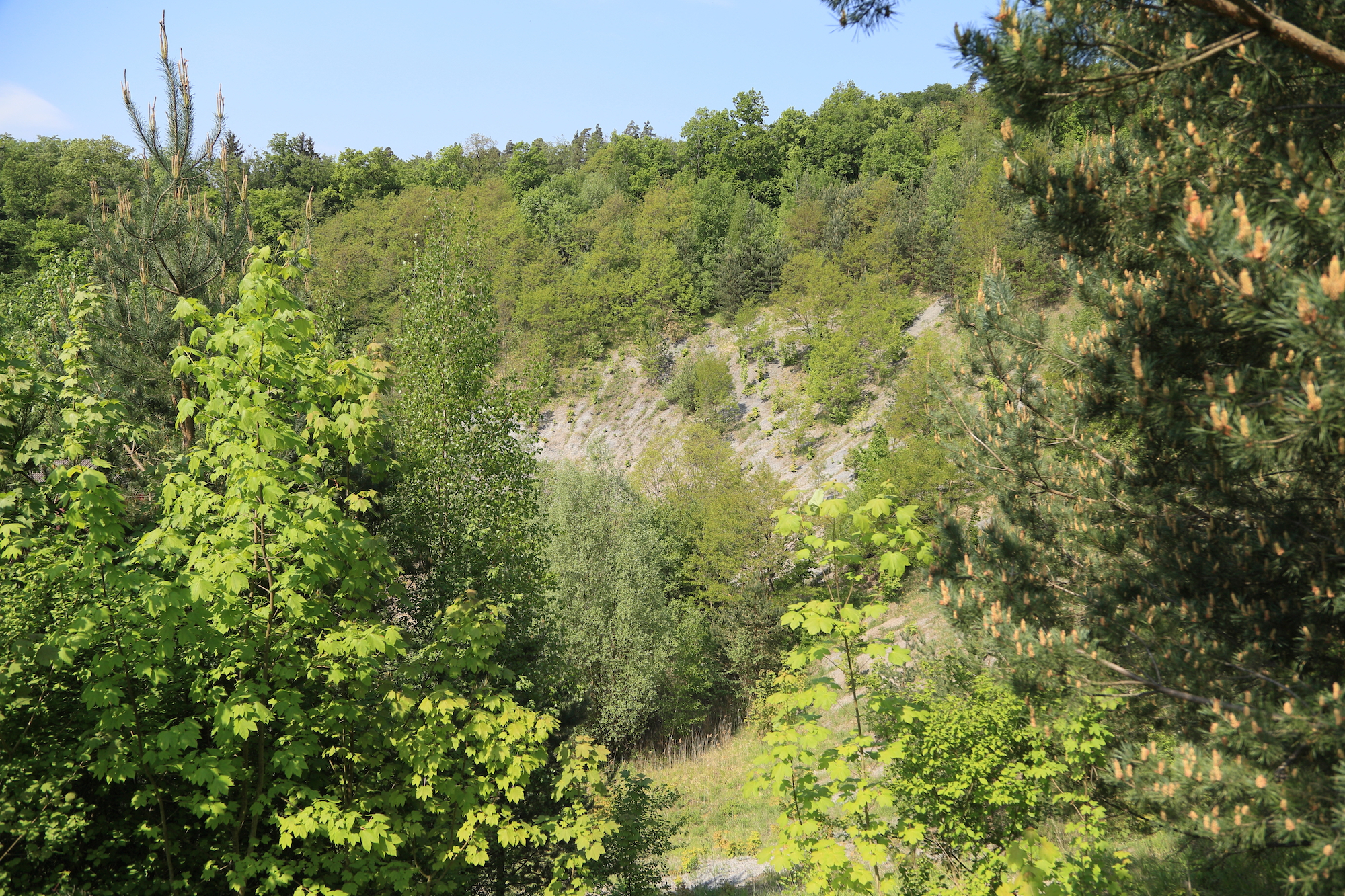 Geotop 574A003/Ehem. Tongrube Reichenschwand/Nürnberger Land/6434 Hersbruck R: 4455482/H: 5486781